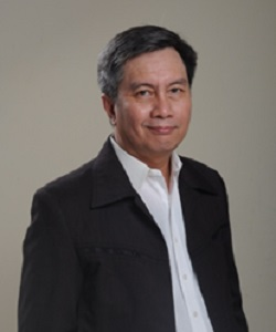 Foto Ketua Umum Kamar Dagang dan Industri (KADIN) Indonesia Eddy Ganefo. Sumber dari dokumentasi pribadi